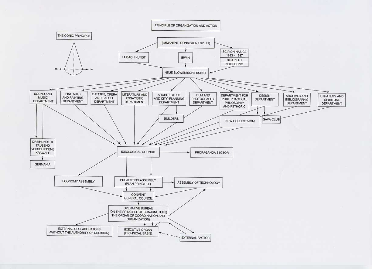 Organisationsstruktur des Kunstkollektivs "Neue Slowenische Kunst (NSK)", Ljubljana 1984)